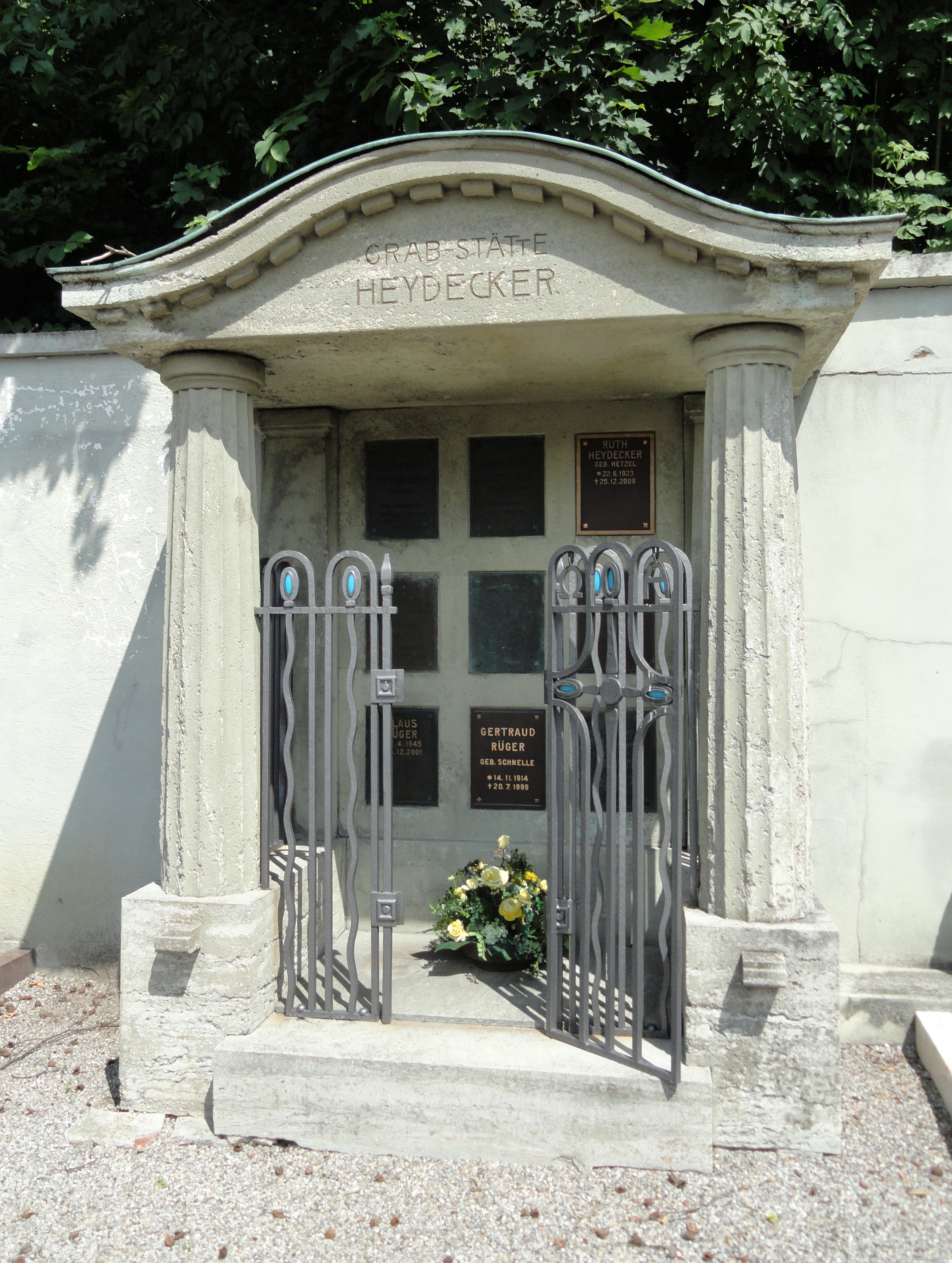 Evangelischer Friedhof Kempten - Friedhofskapelle, Ausgrabungen dahinter sowie Grabstellen einiger "Promis"